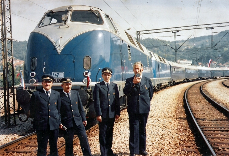 Otvaranje barske pruge 28.05.1976